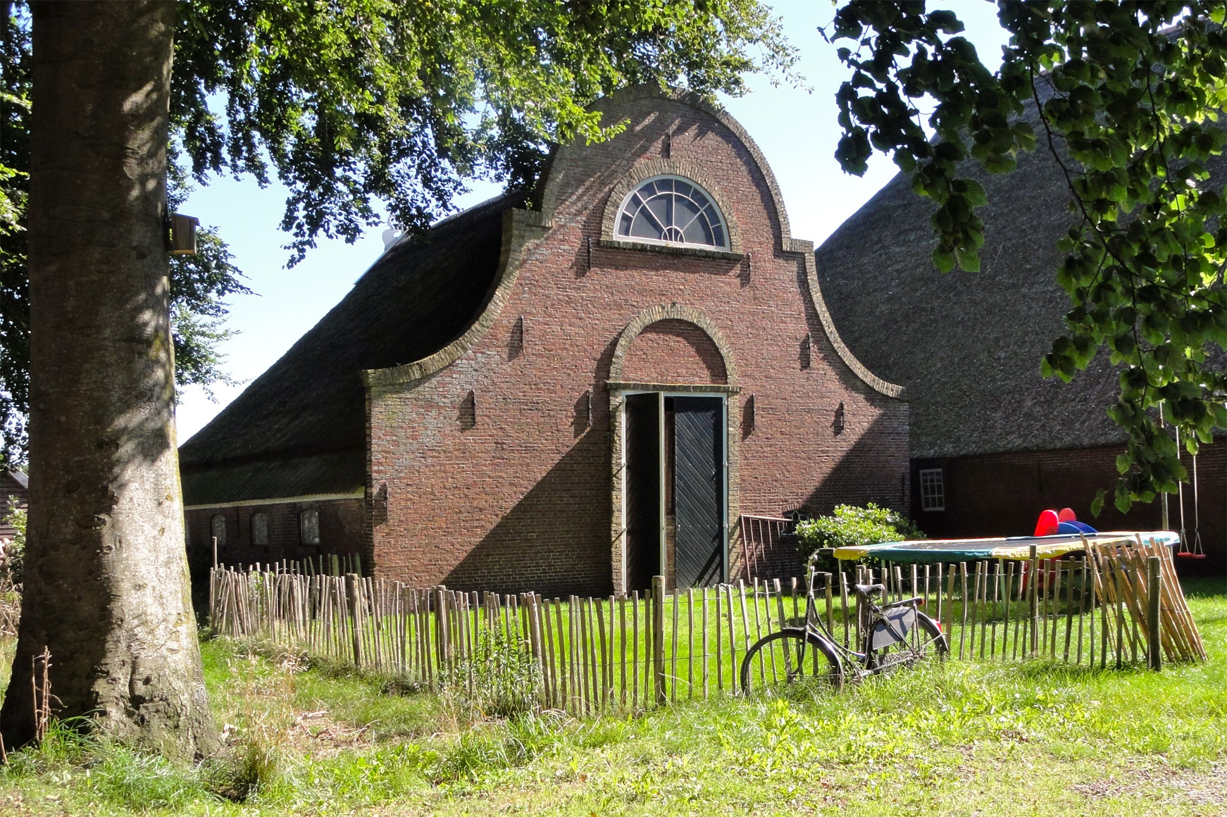 Schuur van een boerderij aan de Boerestreek 6 It Heechsan